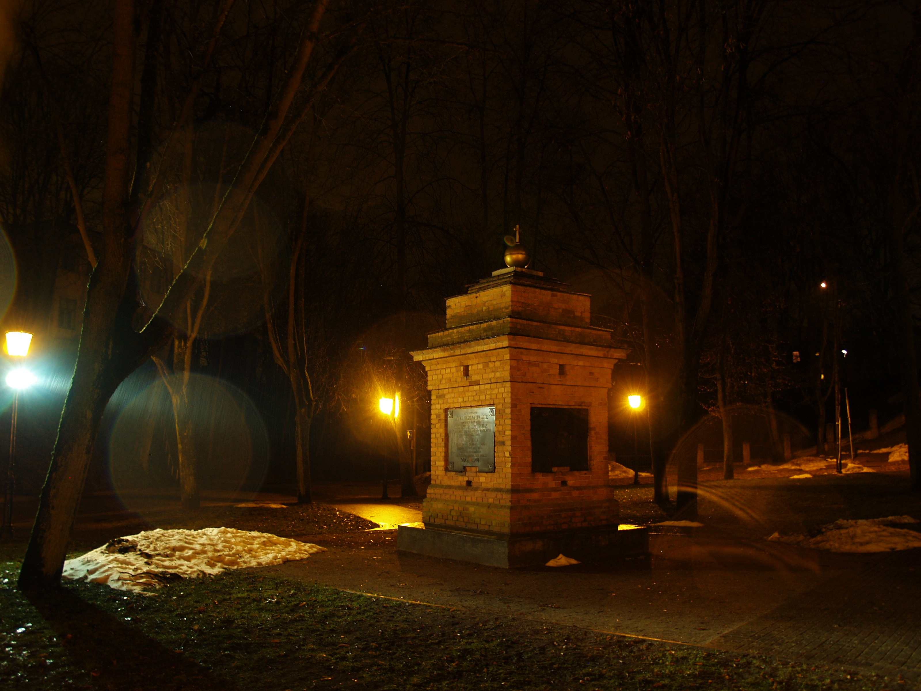 Rahvaste mälestussammas Tartus